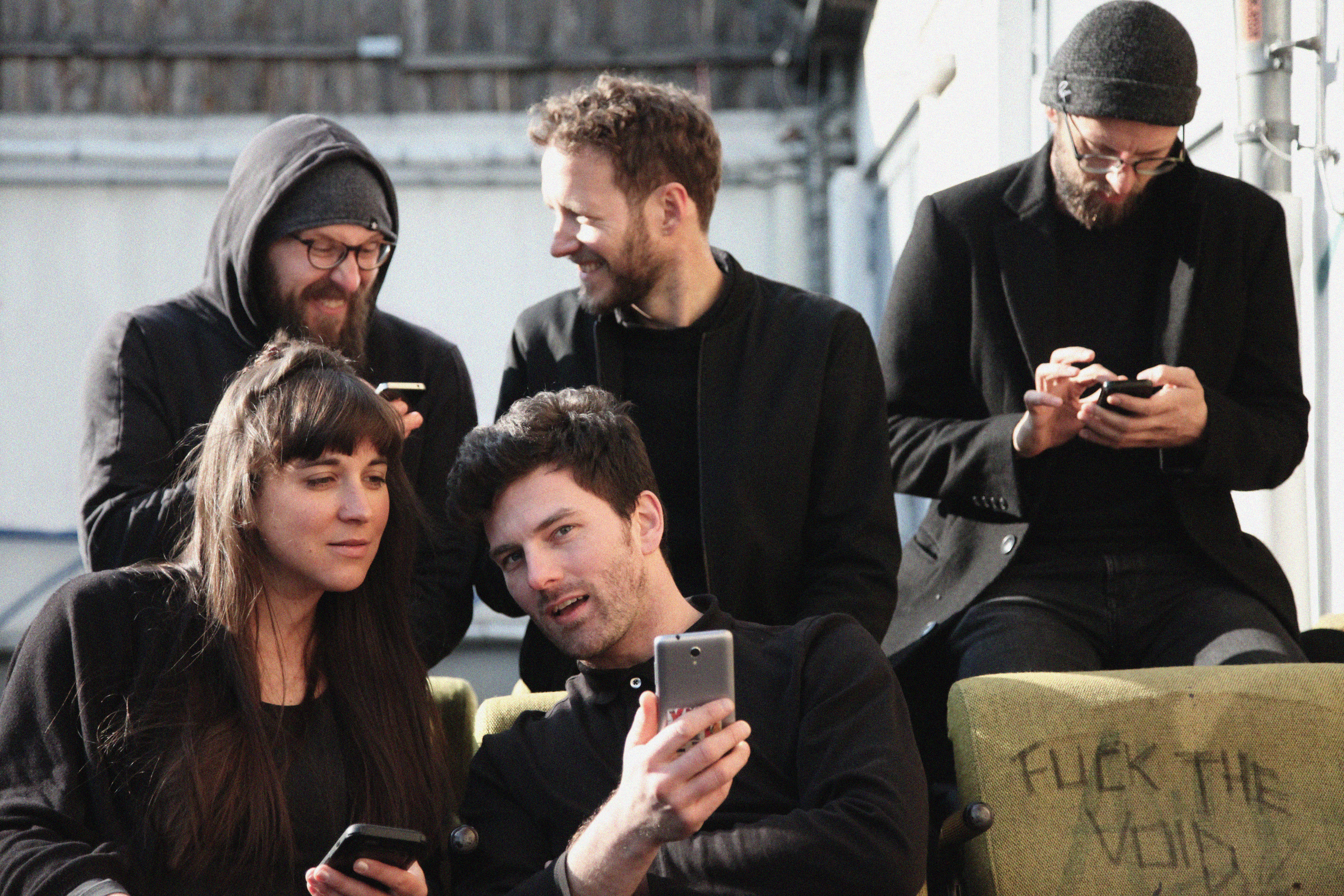 Yuri & Neil neben ihrem Proberaum im März 2018